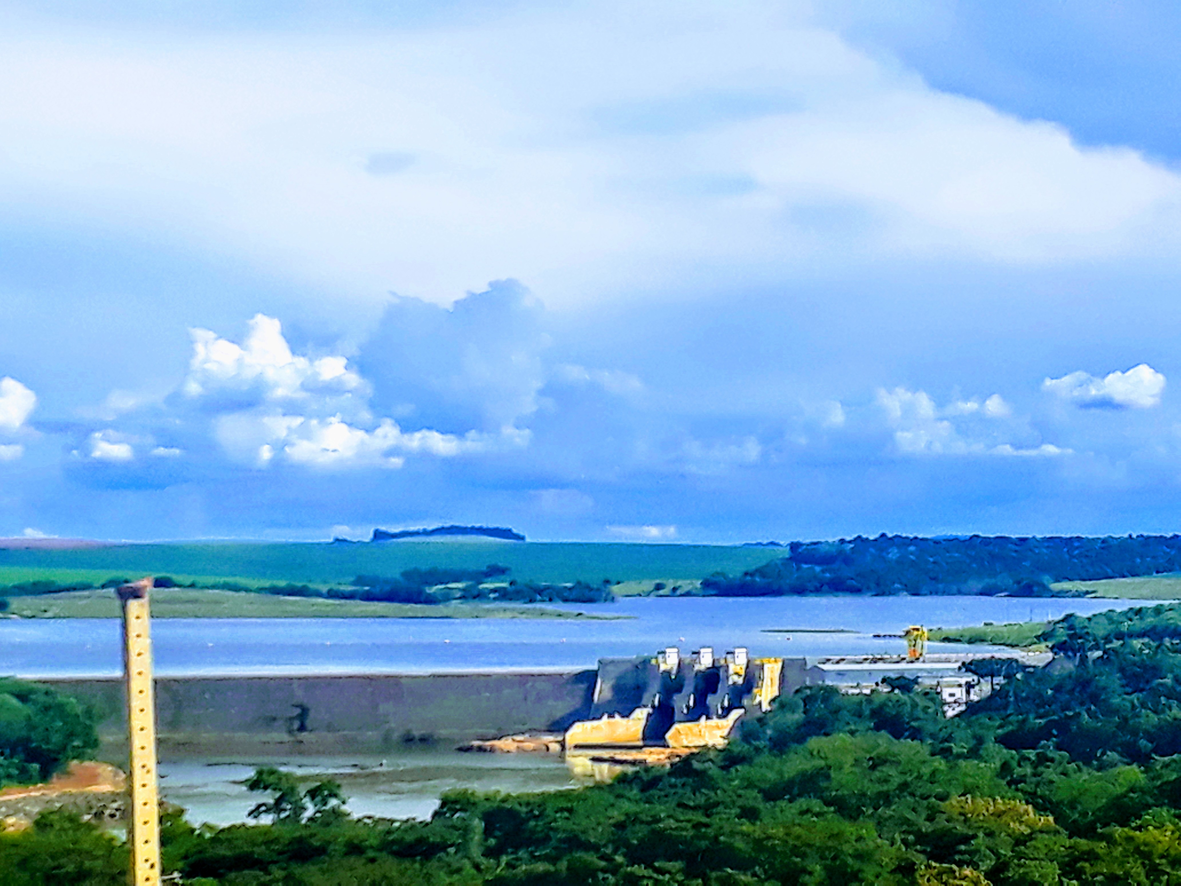 Usina Hidrelétrica Tibagi Montante, em Tibagi, no Paraná.